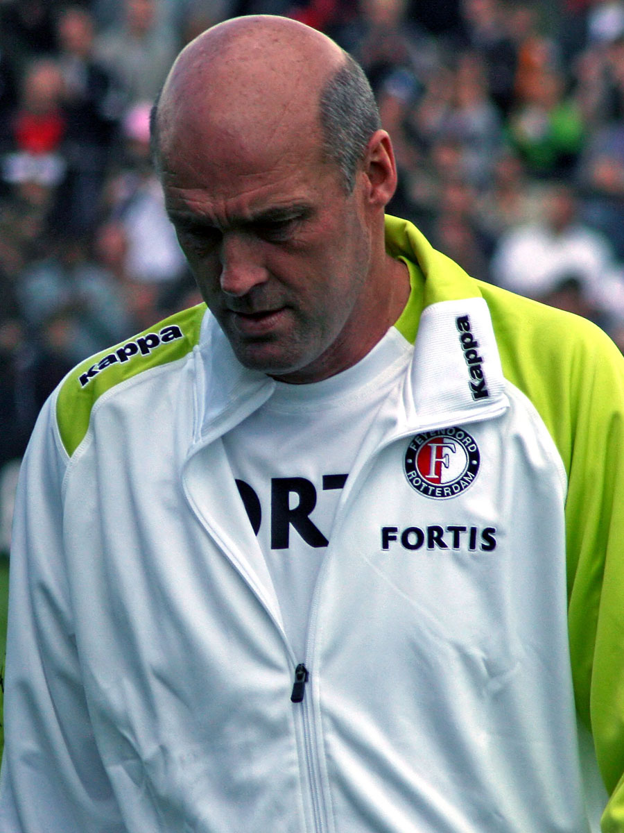 John Metgod (Feyenoord)